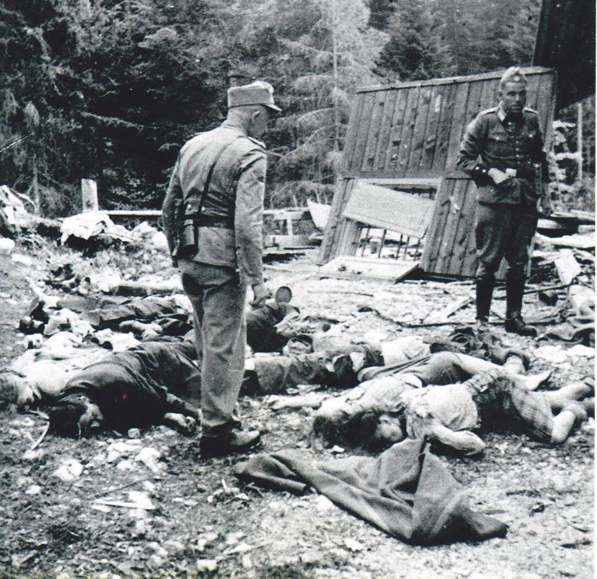 Padli partizani storžiškega bataljona.